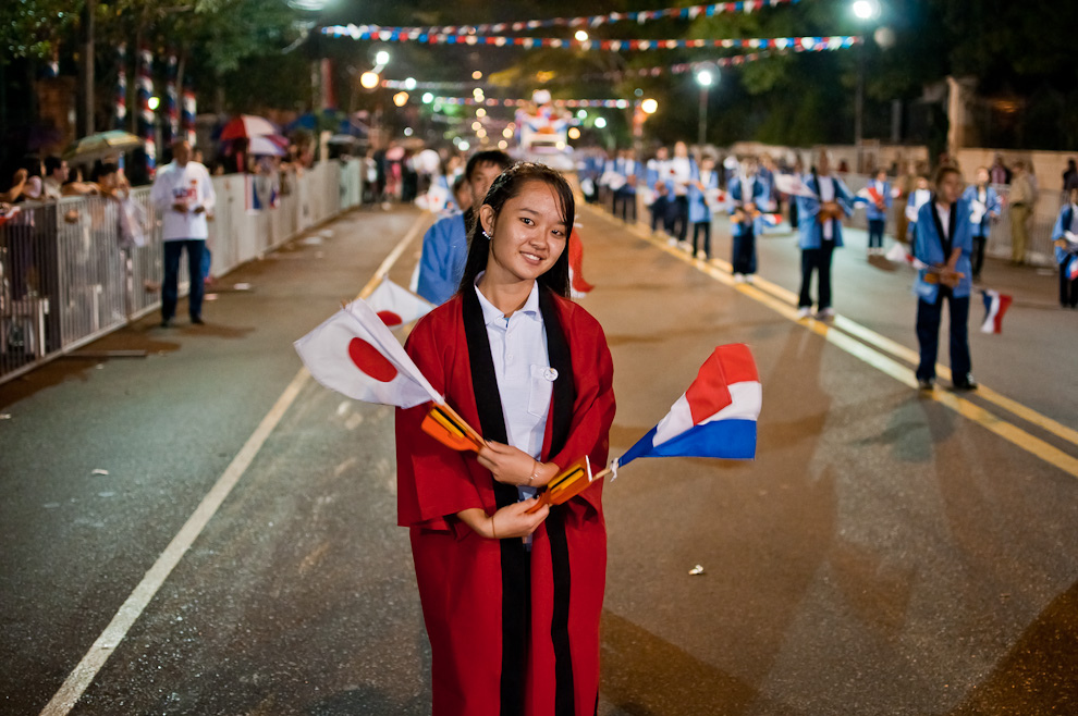 Una bailarina componente de la comparsa japonesa posa con las banderas de Paraguay y Japón durante el Desfile de representaciones de los pueblos originarios, inmigrantes, de carnavales de Paraguay y de naciones invitadas el sábado 14 de Mayo de 2011 sobre la Avenida Mariscal López.